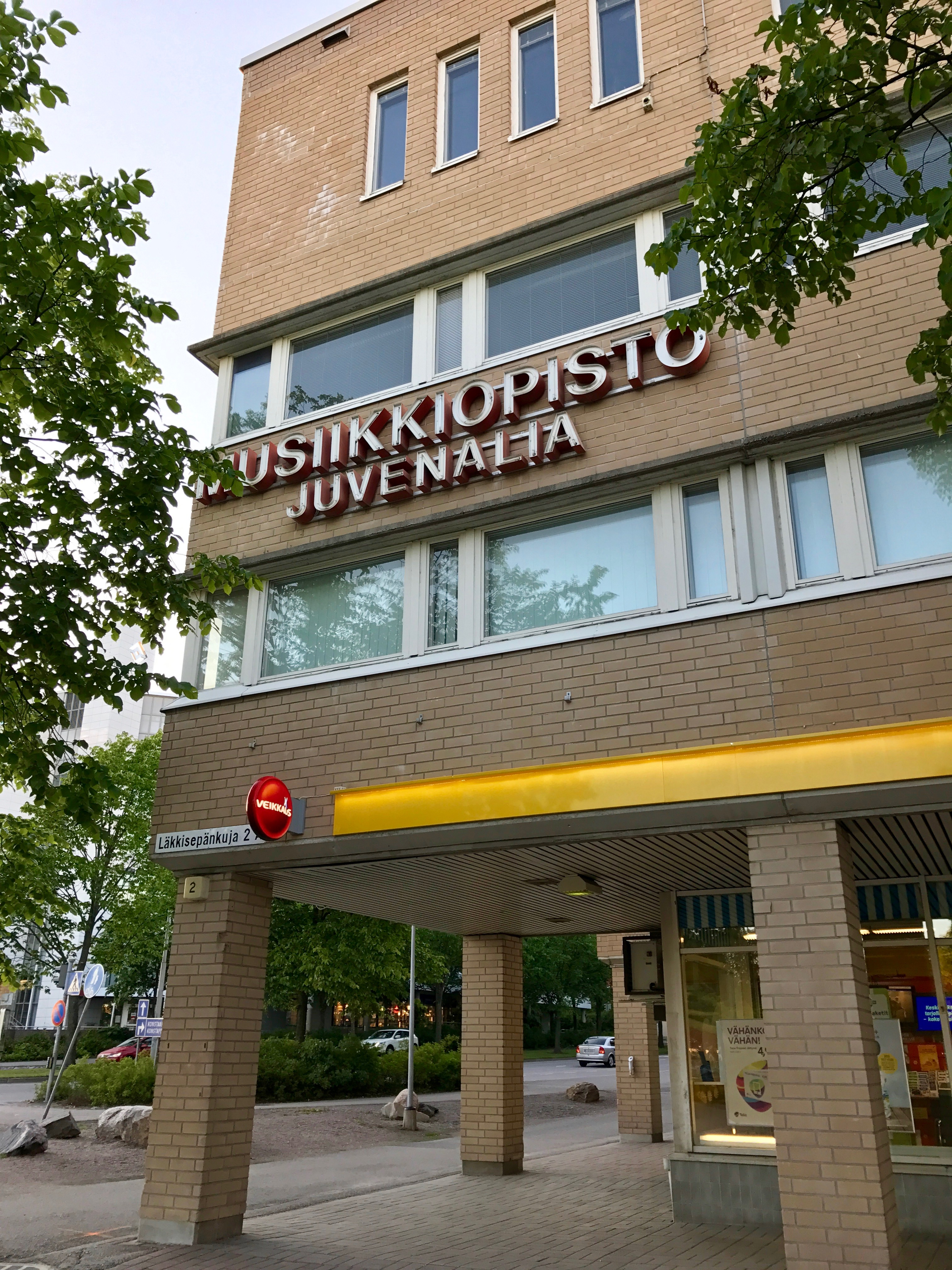 Musiikkiopisto Juvenalian toimipiste Espoon Leppävaaran Galleriassa.